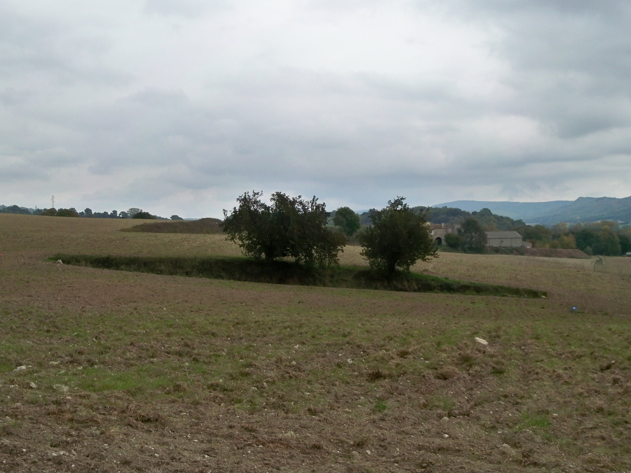 Doline près de Céreste, Alpes de Haute Provence, France